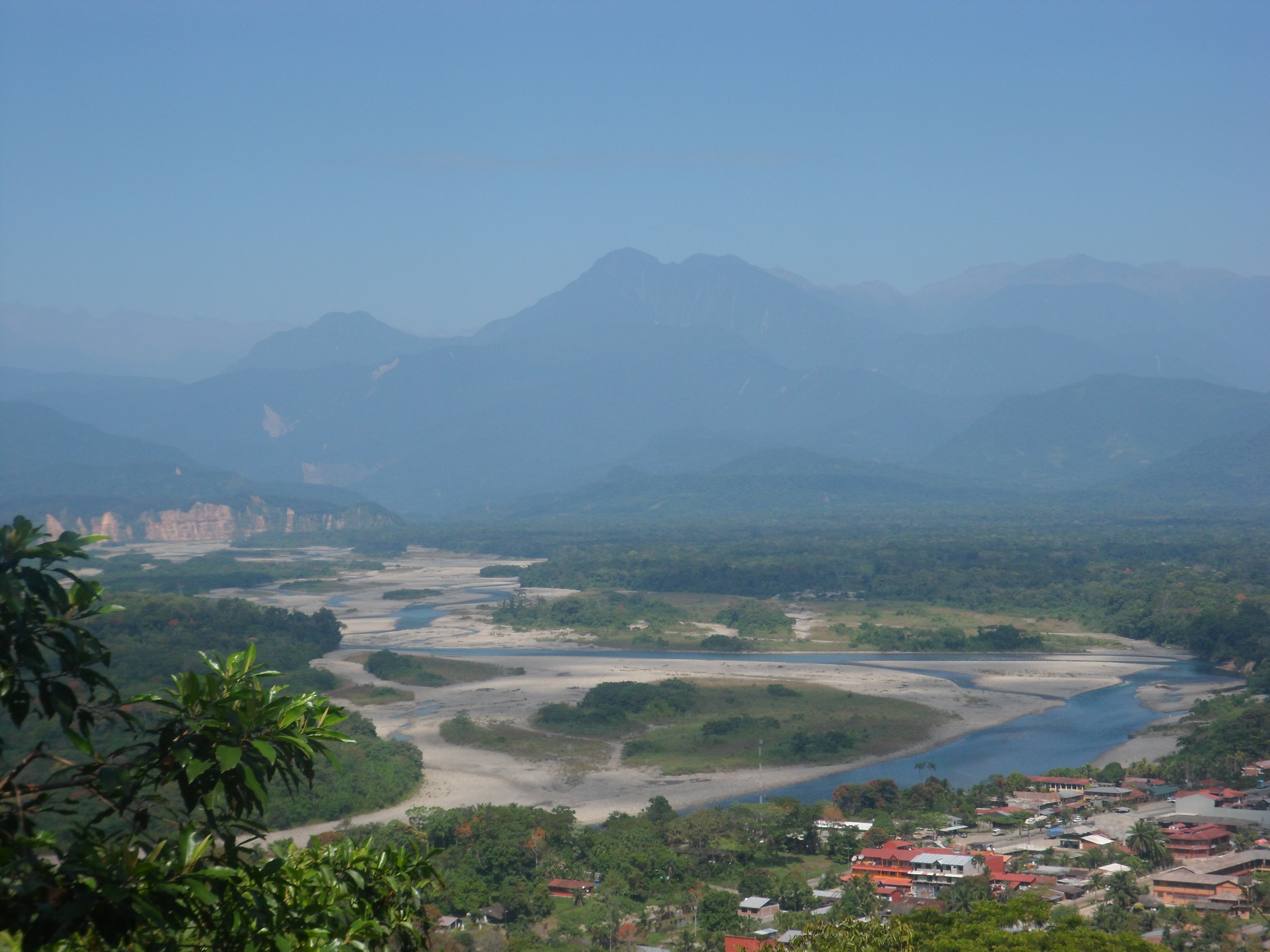 vista panoramica del bello paisaje de villa tunari (chapare)